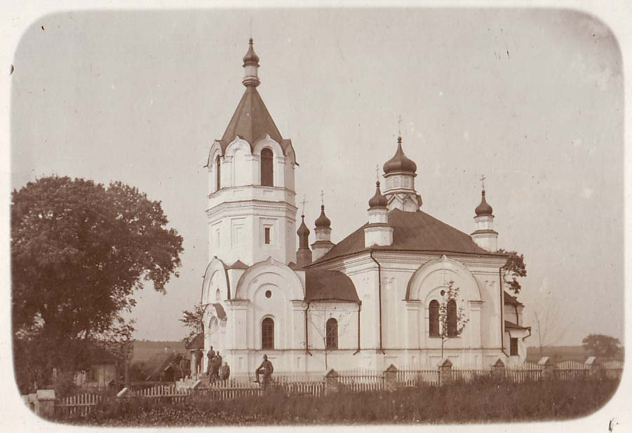 Беларуская (тарашкевіца): Харошча (Charošča). Пакроўская царква-мураўёўка